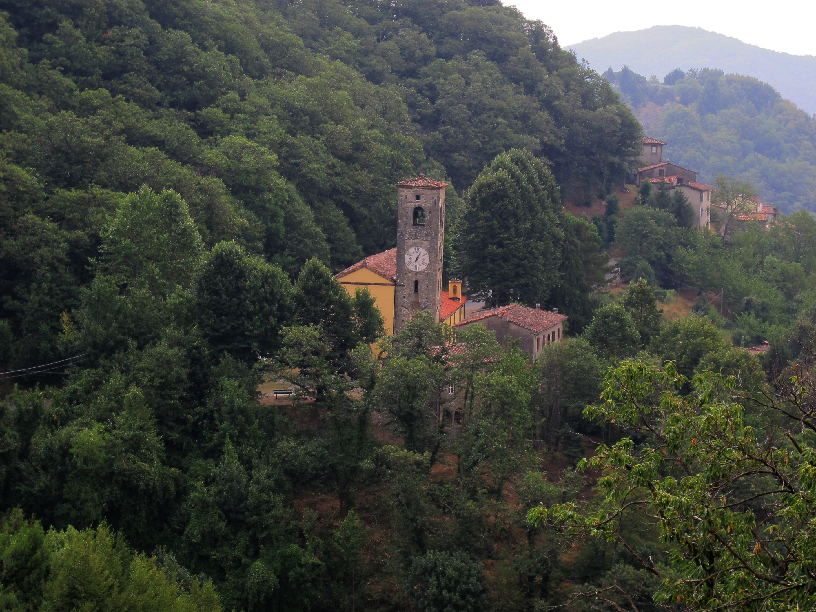 Pescaglia, SS. Pietro e Paolo apostoli, 00.1